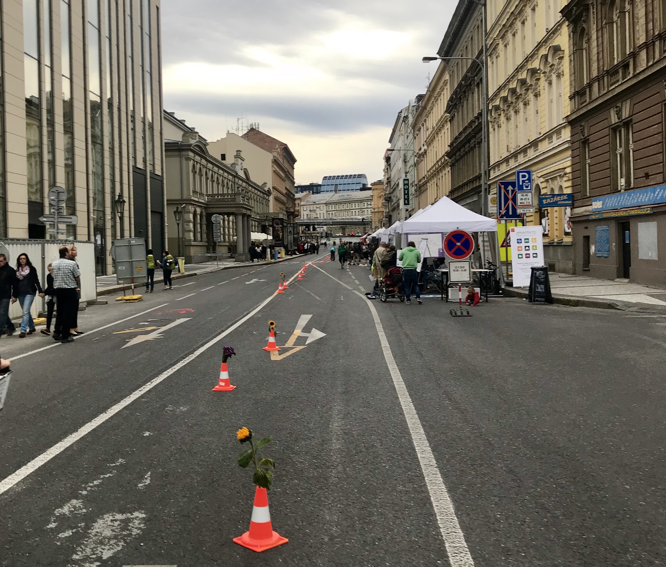 Den bez aut 2018 v Praze (Karlín, ulice Křižíkova) – organizováno organizací Čistou stoupou Prahou (Car-Free Days Prague)